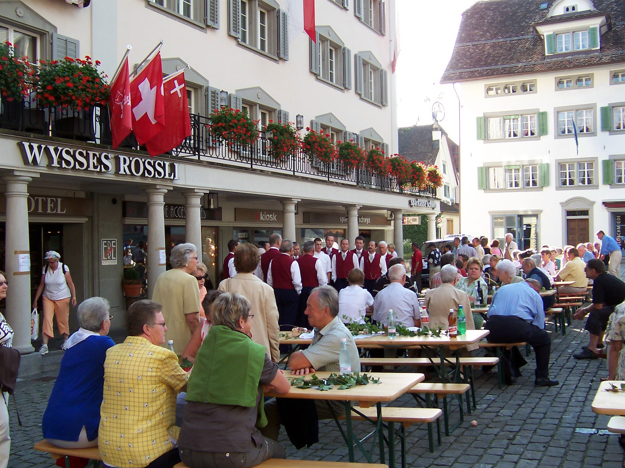 Schwyz, Wysses Rössli am Hauptplatz